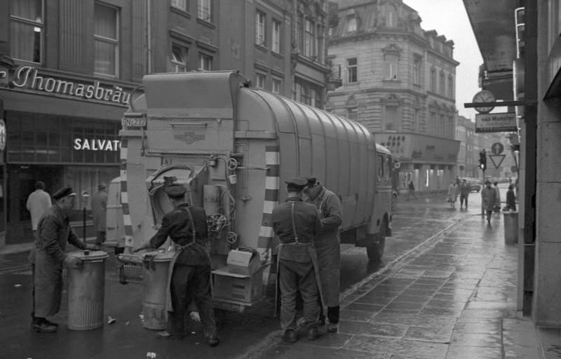 Stadtaufnahmen aus Bonn u. Bad Godesberg Straßenbilder 17.-20.1.1962